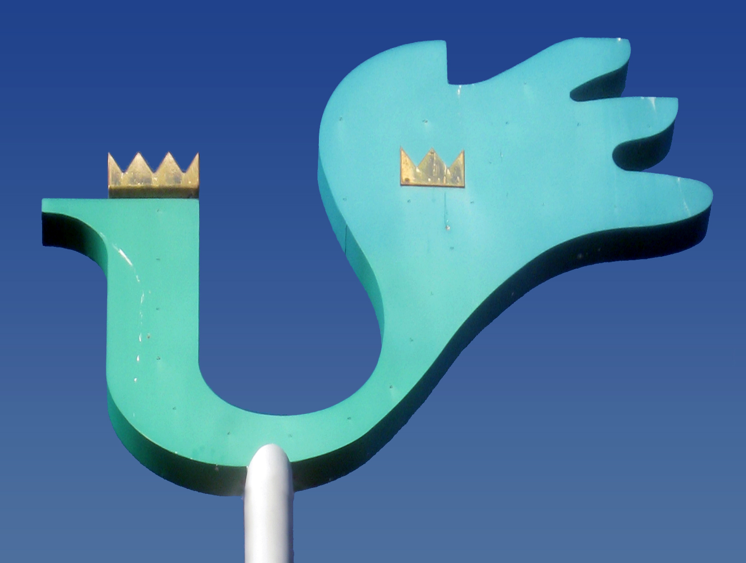 Turmhahn des Killesbergturms, Stuttgart, Höhenpark Killesberg. Der Hahn wurde nach dem Signet des Grünen U geschaffen, das der Landschaftsarchitekt Hans Luz entwarf und das in stilisierter Form die Angelhakengestalt der miteinander verbundenen Parkanlagen des Grünen U zeigt. Beschreibung des Signets auf der Webseite des Verschönerungsvereins Stuttgart ([1]): „Das von Professor Hans Luz entworfene Signet des »Grünen U«, welches auch weithin sichtbar die Spitze des Killesbergturms ziert, zeigt anschaulich das Konzept von mehreren miteinander verbundenen Parkanlagen und Waldgebieten, welche die Form eines U bilden: ausgehend vom Schlossgarten über Rosensteinpark, Leibfriedscher Garten, Wartberggelände, Killesbergpark und Kräherwald bis zum Schwarz- und Rotwildpark. Dabei wird das Neue Schloss als Ausgangspunkt durch die fünfzackige, das Bärenschlössle als Ziel durch die dreizackige Krone versinnbildlicht.“